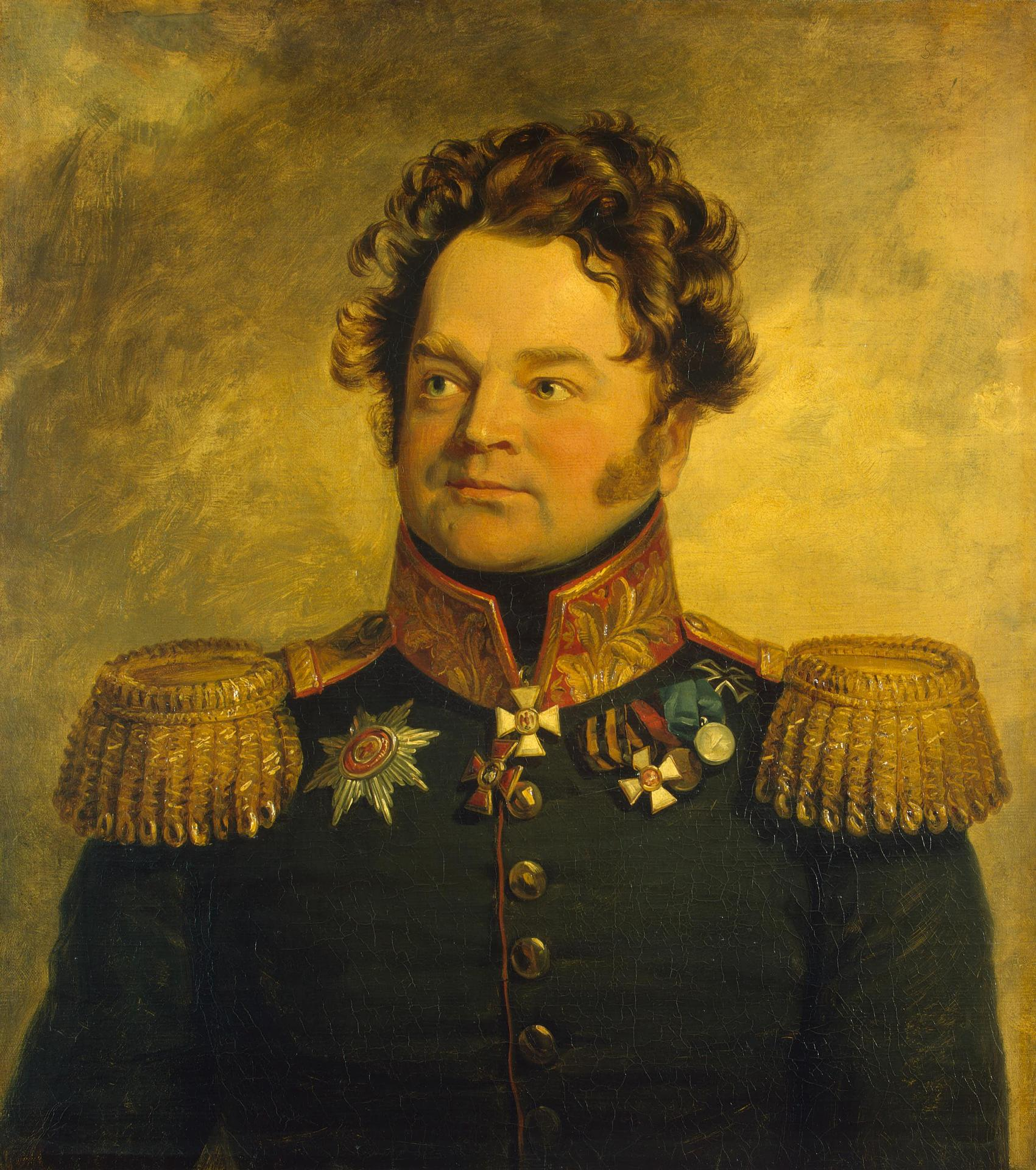 Nikanor Mihailovich Svechin (03.07.1772 – 13.02.1849) russian general